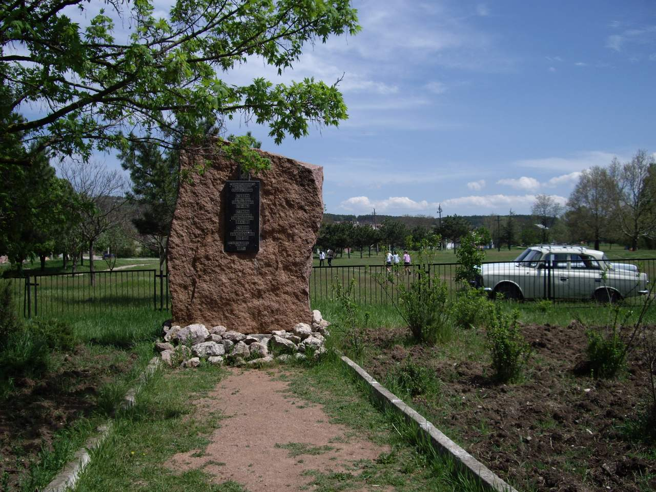 Памятник Стевенам на месте дома. Христиану Христиановичу(1781-1863), Александру Христиановичу(1844-1910), Александру Александровичу(1879-1921)